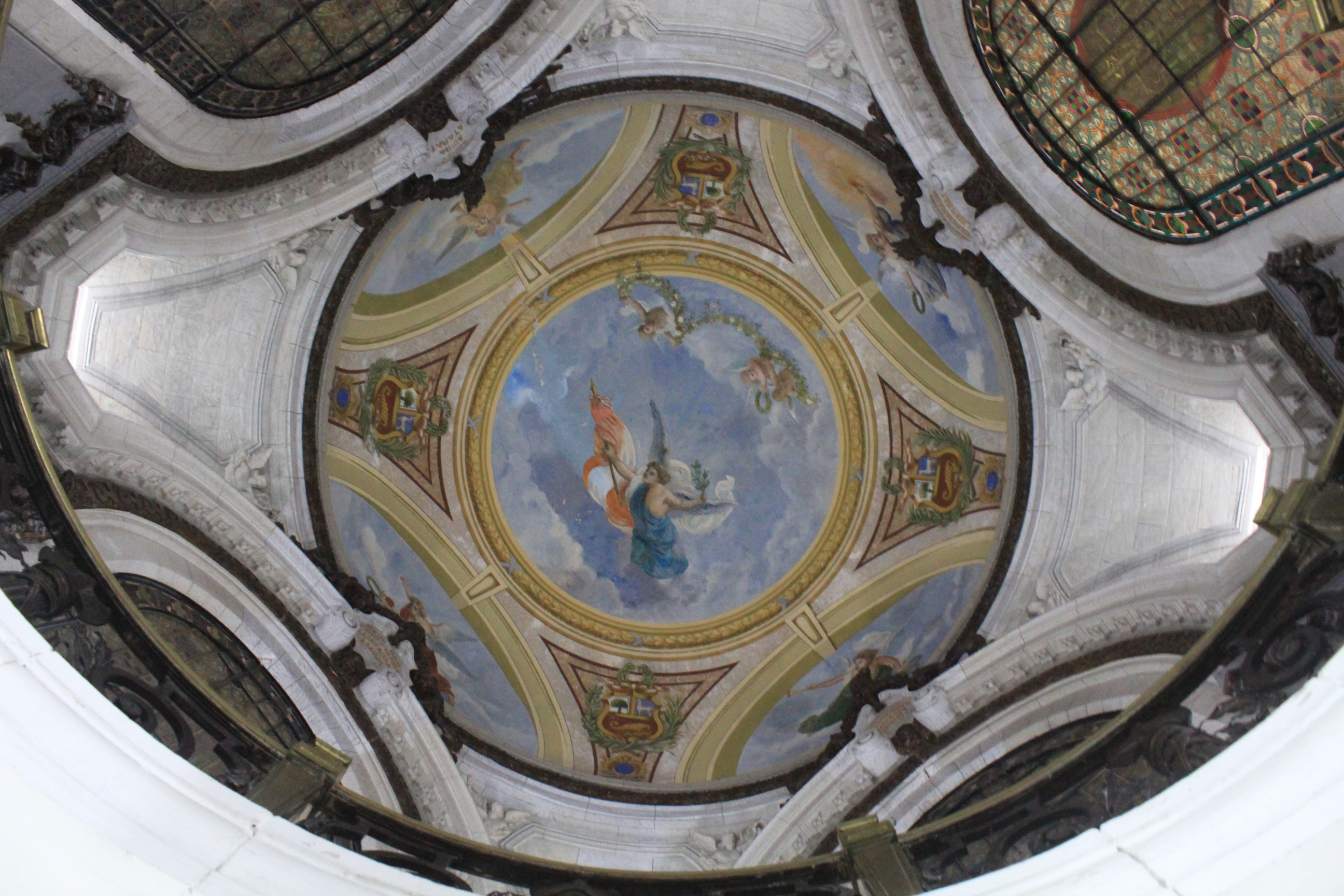 Cementerio Presbítero Maestro. Perú - Lima. Setiembre 2012